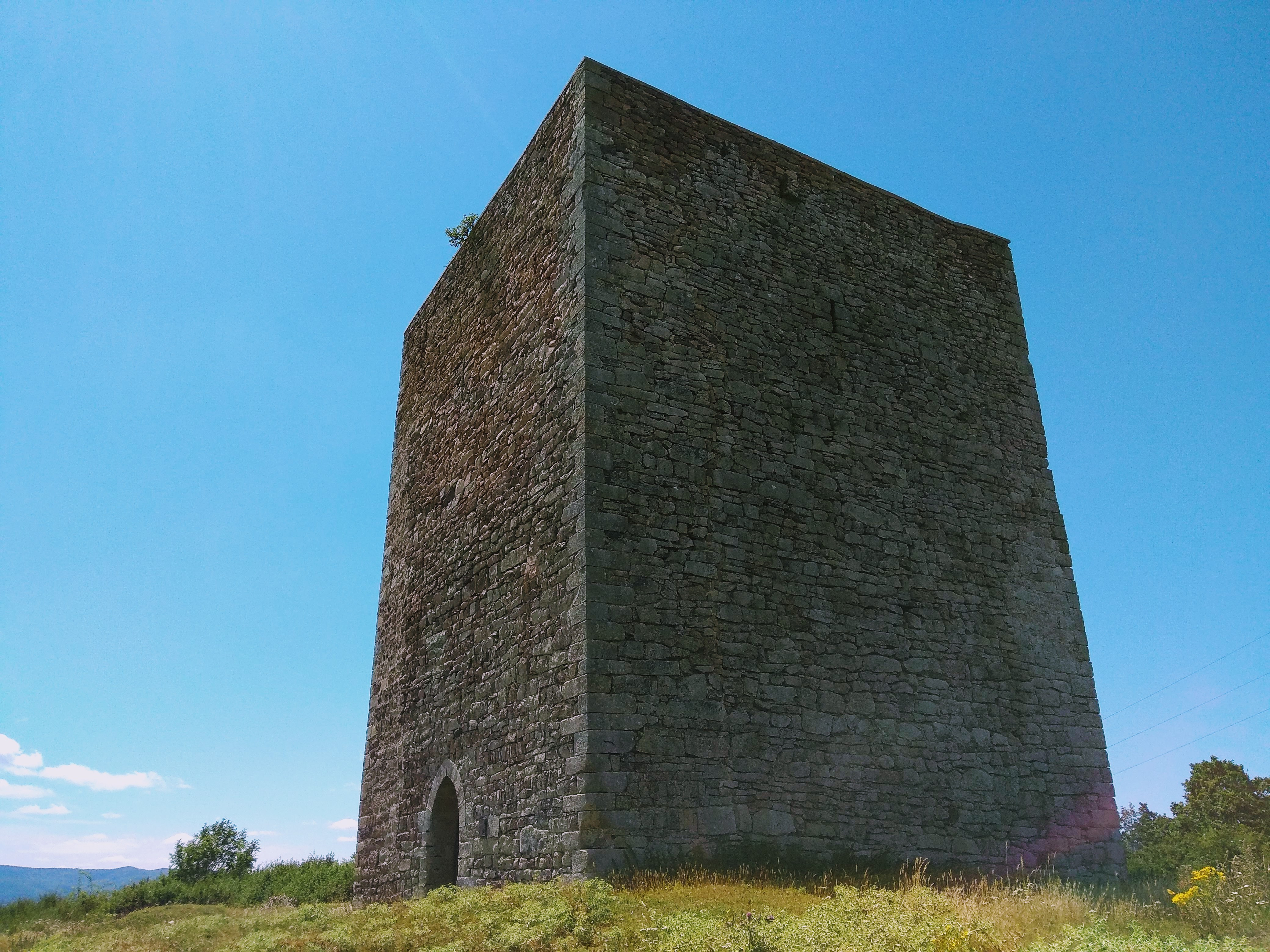 Exterior de la torre medieval de San Martín de Hoyos en el municipio de Valdeolea, España